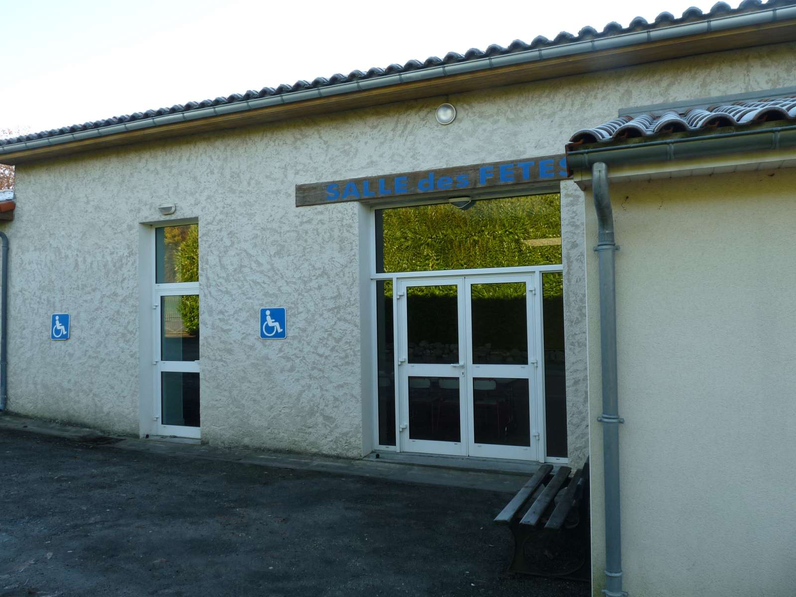 salle des fêtes de Fontenille, Charente, France